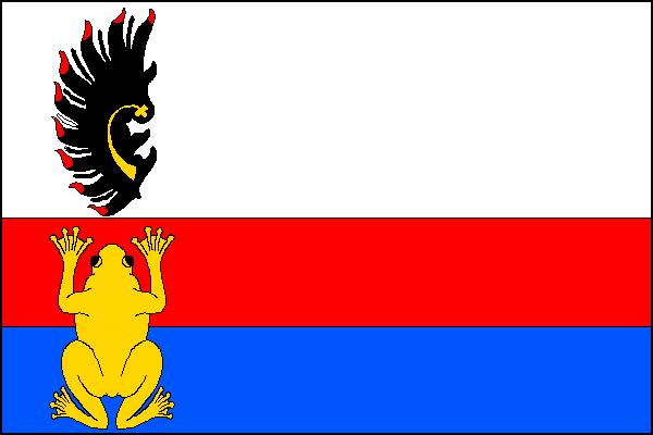 Vlajka obce Žabonosy